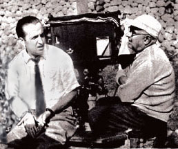 Il regista Luigi Zampa e l'operatore Carlo Montuori sul set di "Campane a martello" (Zampa, 1949)